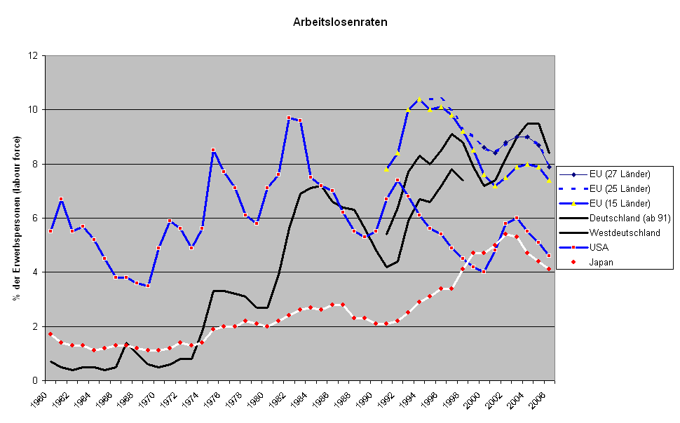 international comparison unemployment rates USA, FRG, Japan